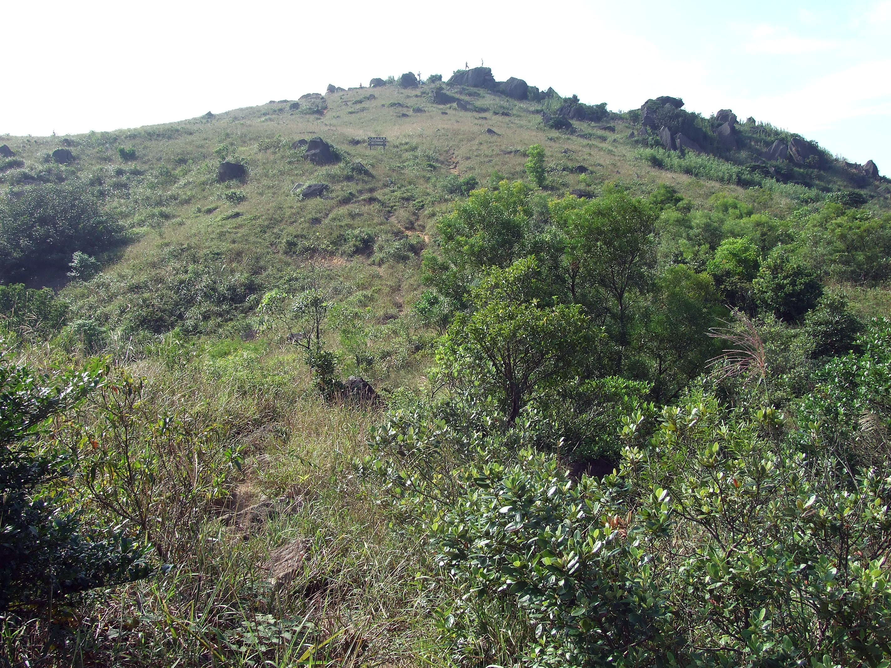 鹿巢山北麓